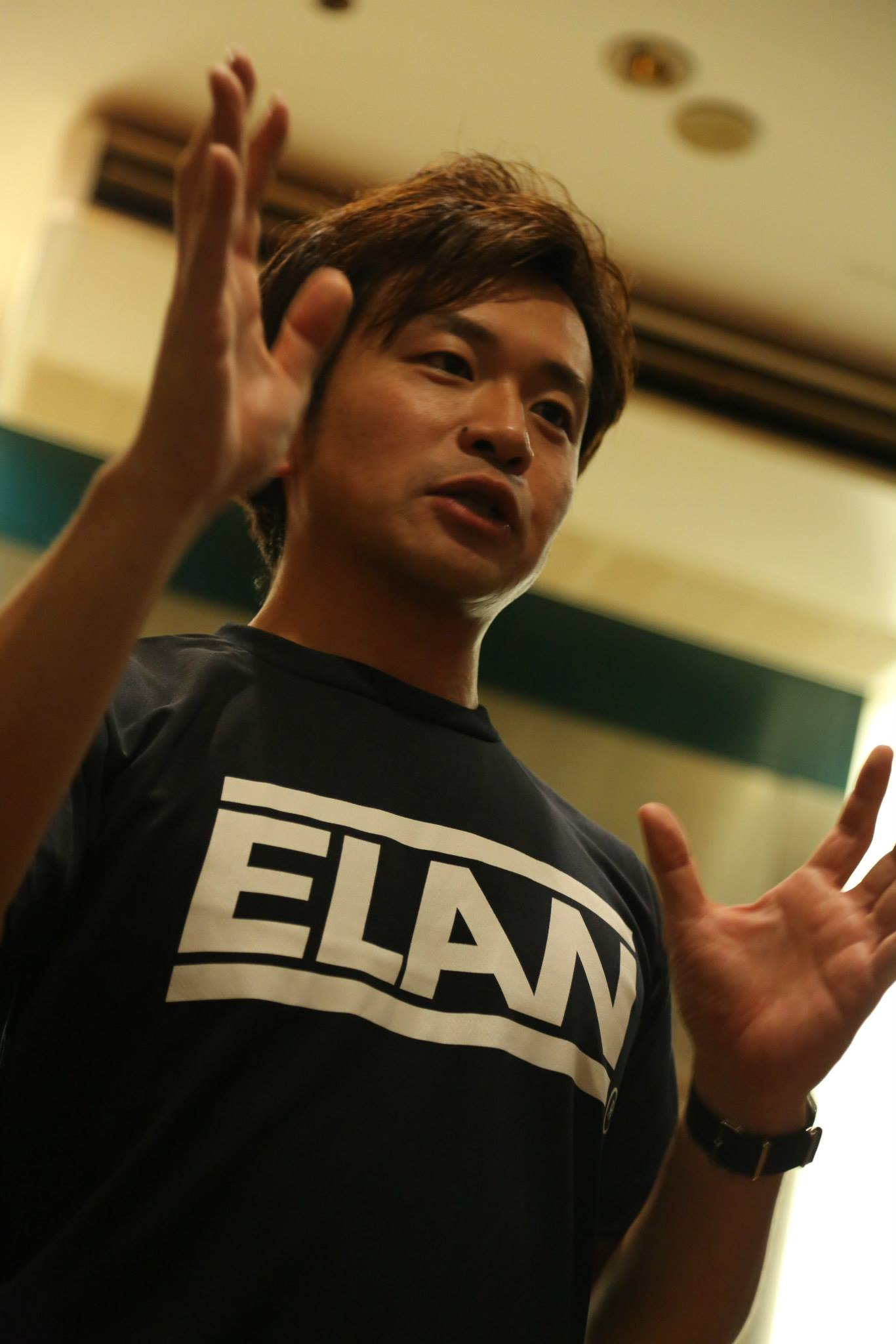 2015 TEAM GREEN MEETINGより